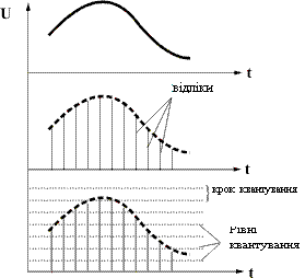 дискретизація, пояснювальна схема